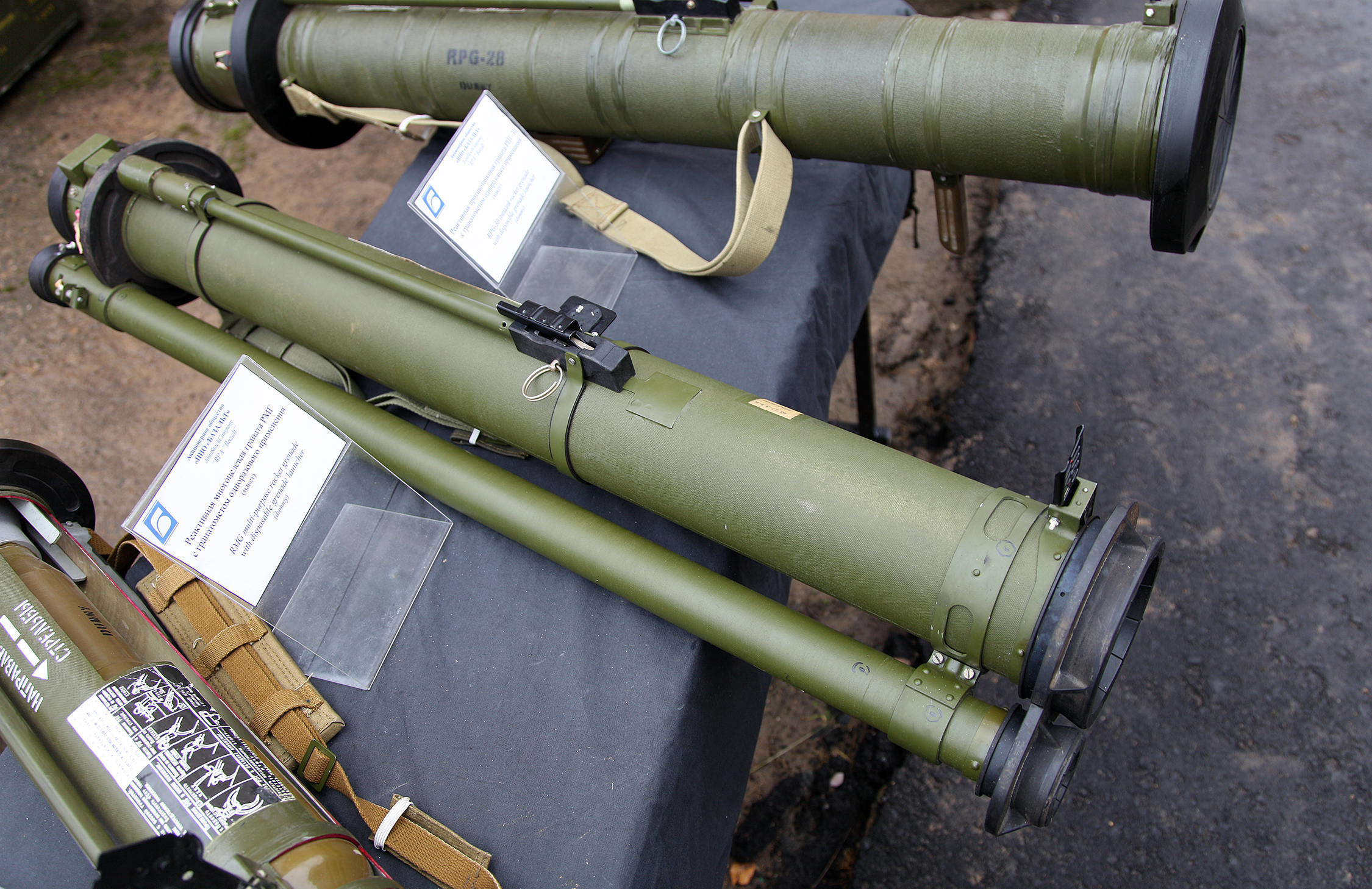 РПГ-30